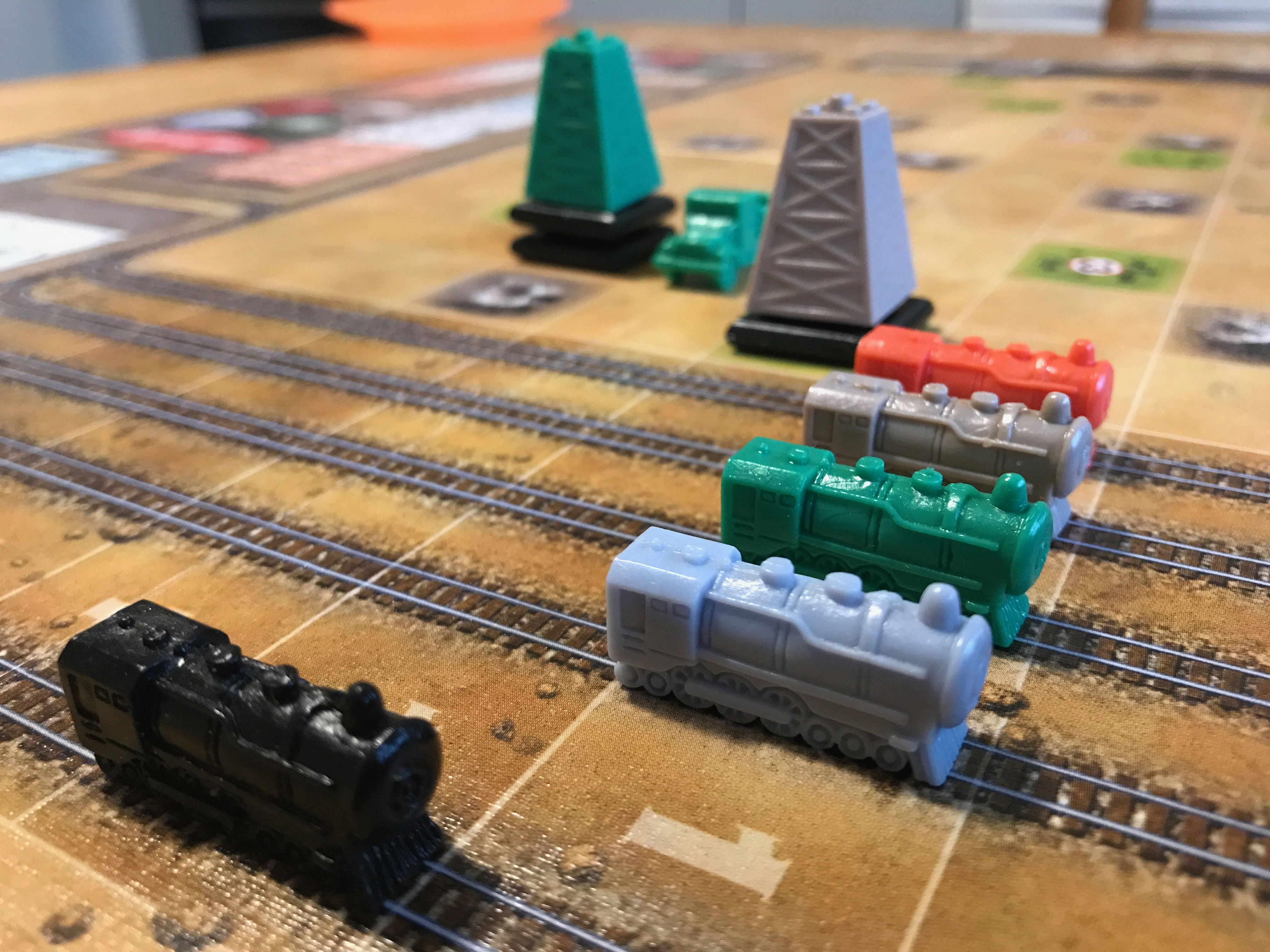 Spielmaterial des Brettspiels Giganten (1999)